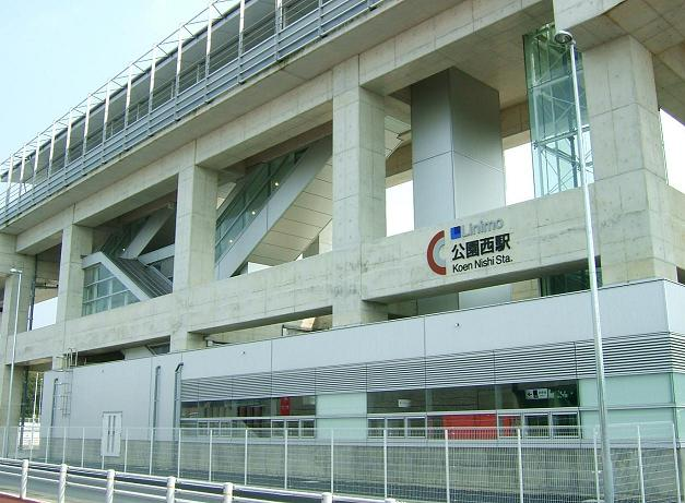 愛知県愛知郡長久手町大字熊張に所在する東部丘陵線（リニモ）の公園西駅。